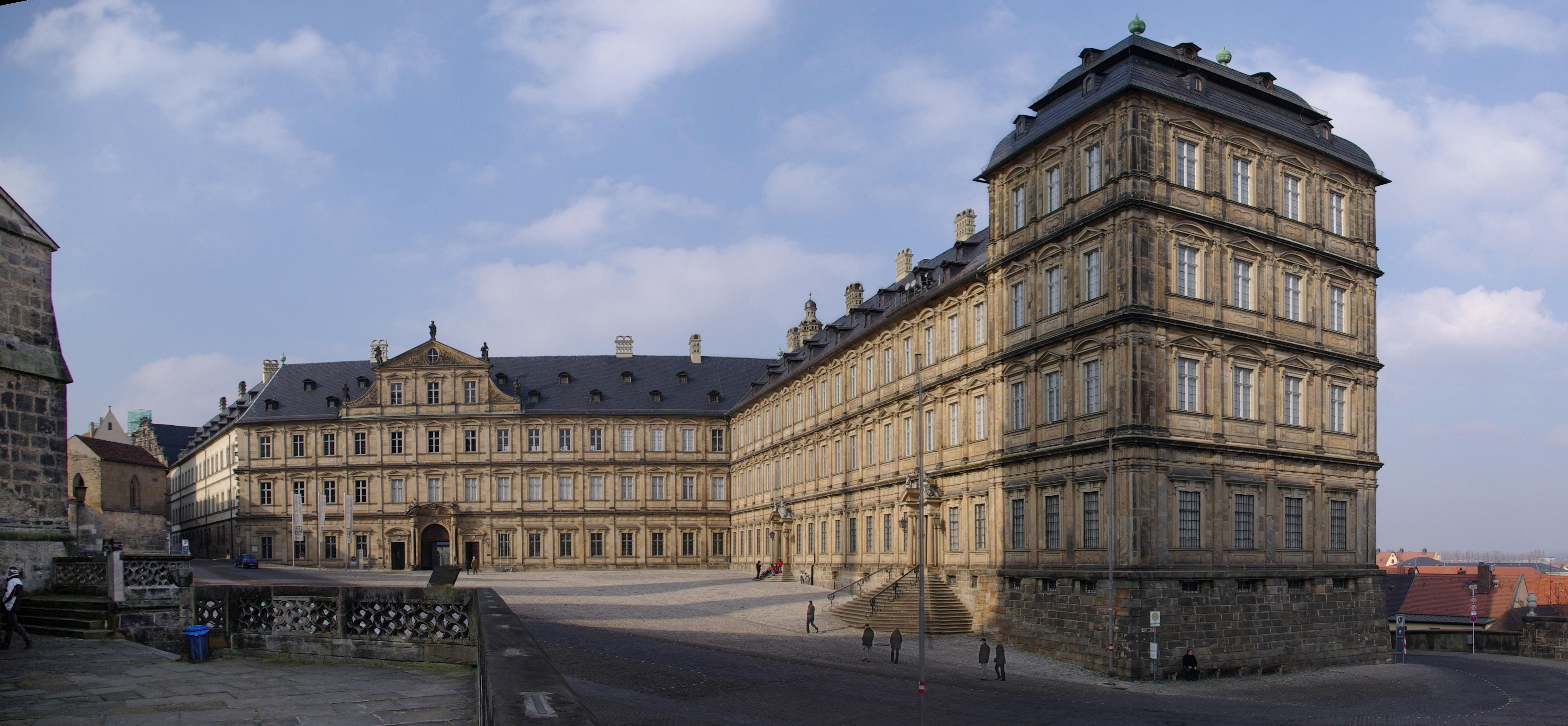 Neue Residenz in Bamberg, Deutschland